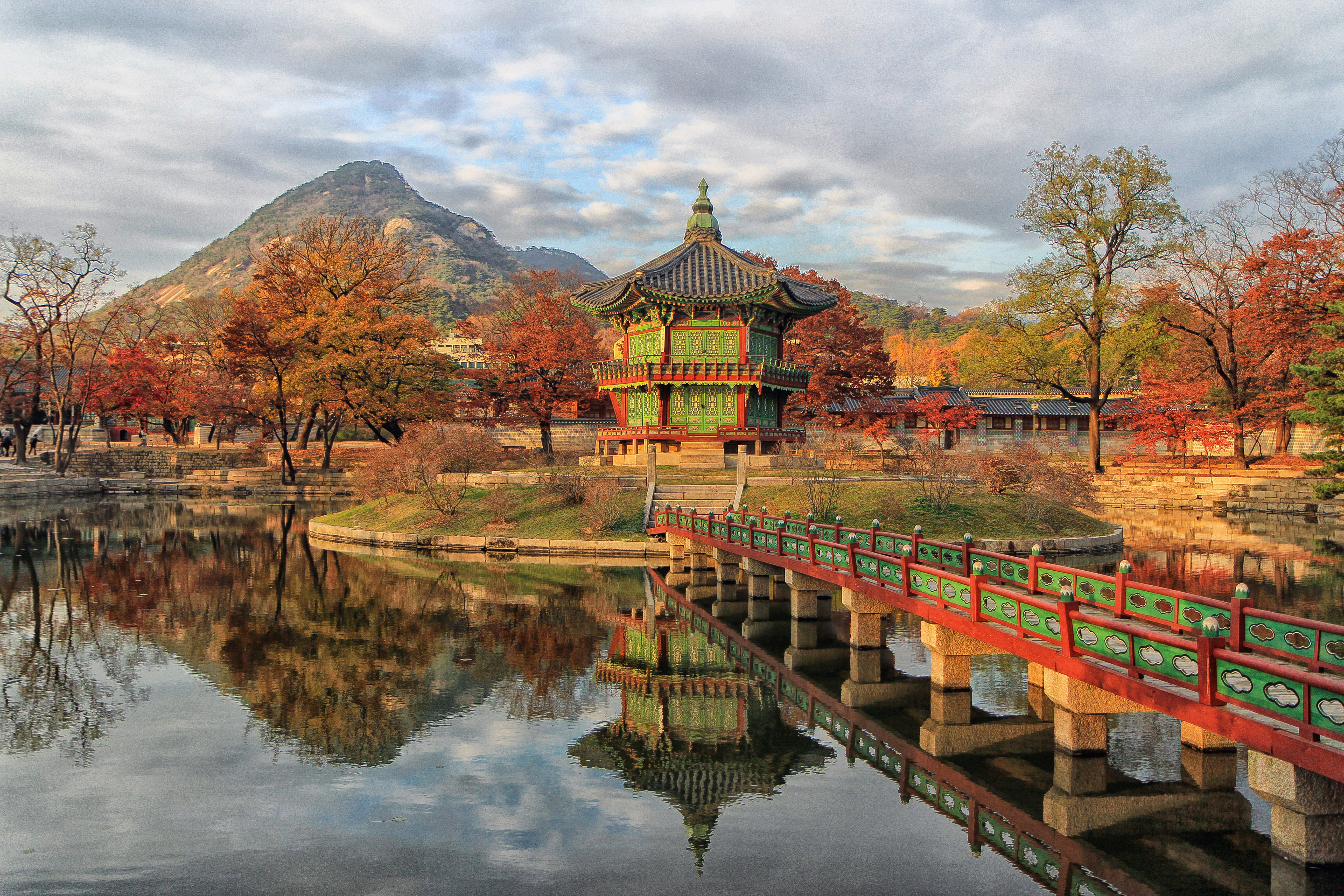 단풍으로 물든 가을옷을 입은 경복궁 향원정의 풍경